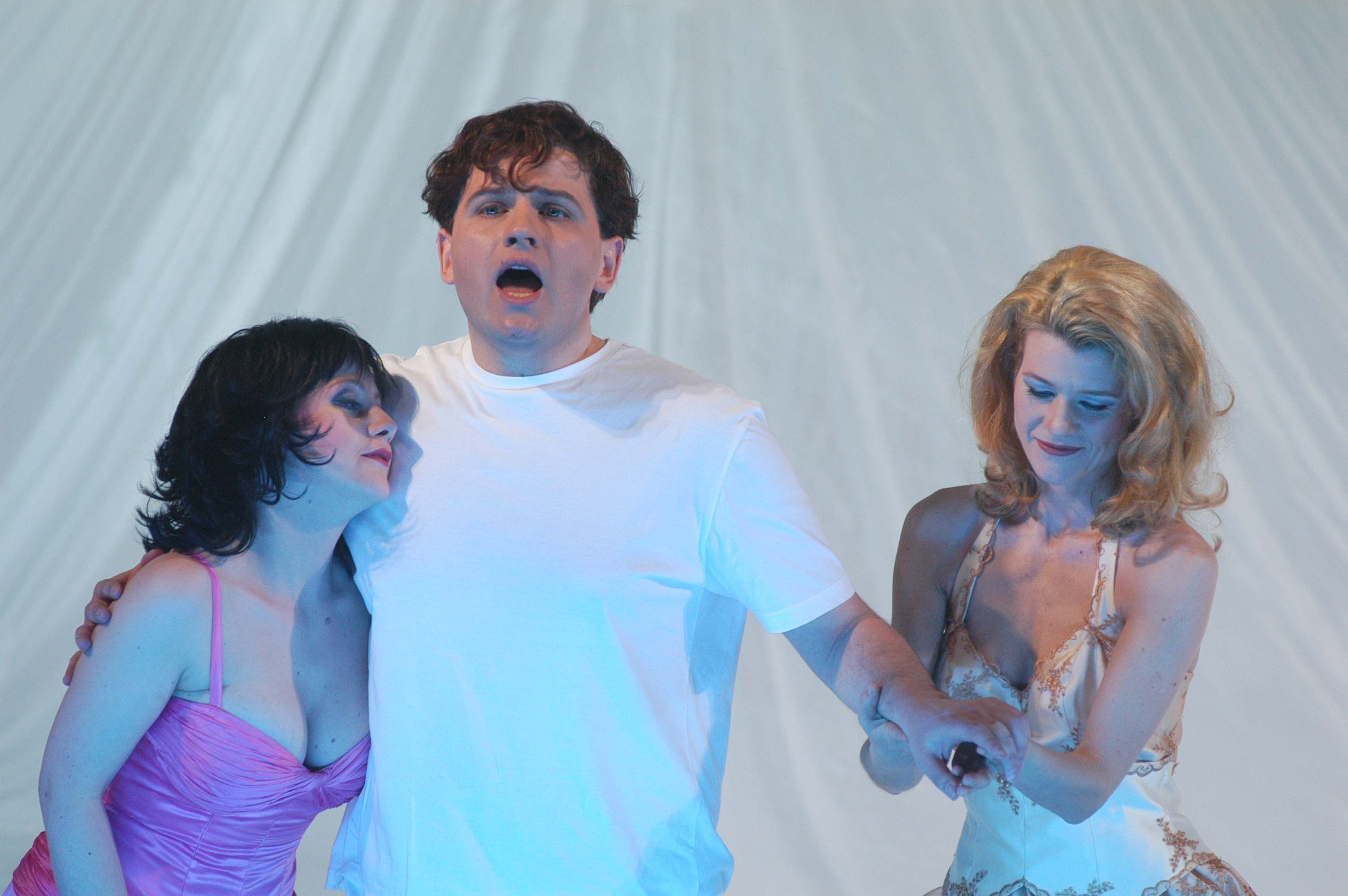 Blagoj Nacoski